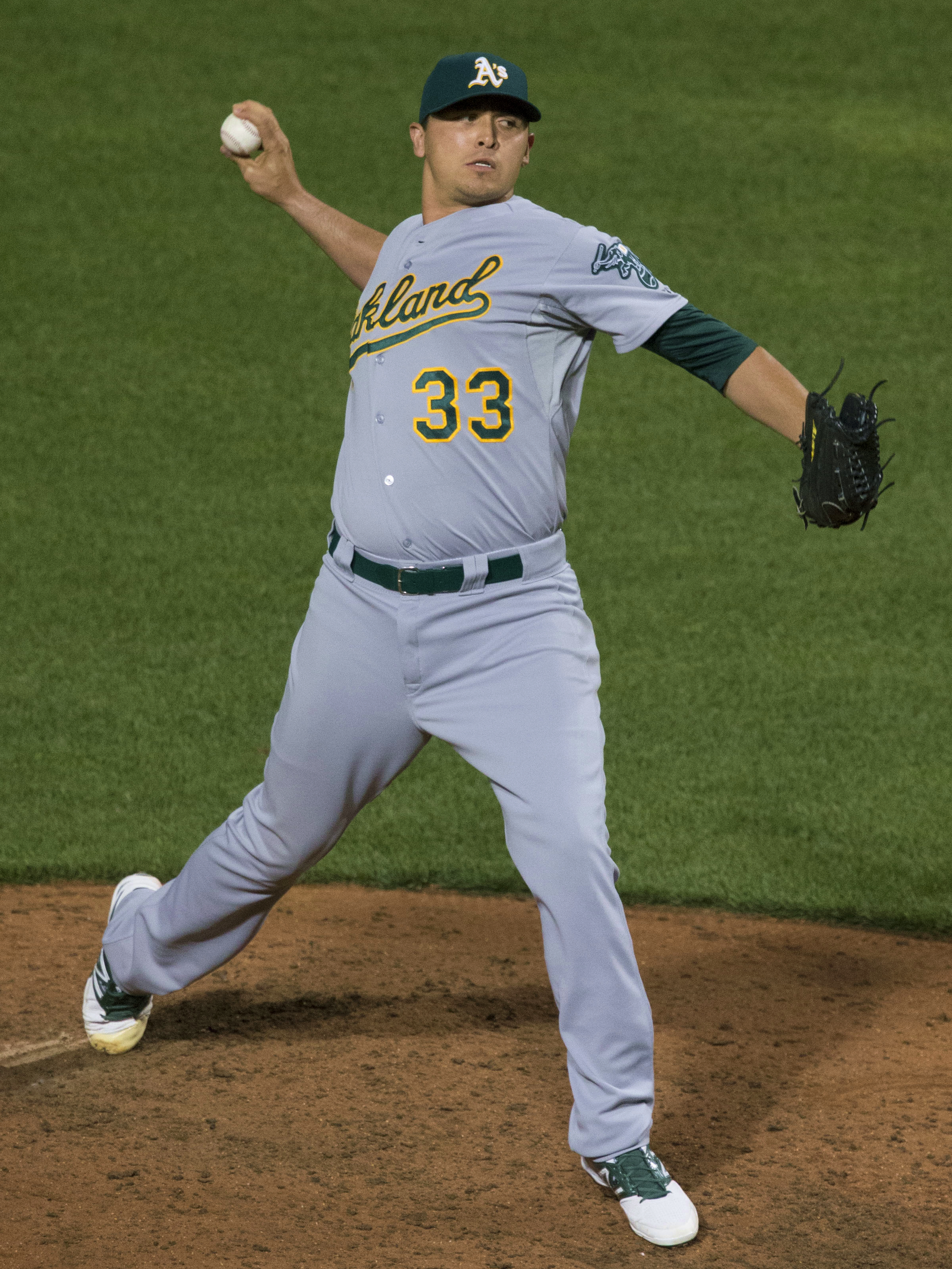 Fernando Rodriguez